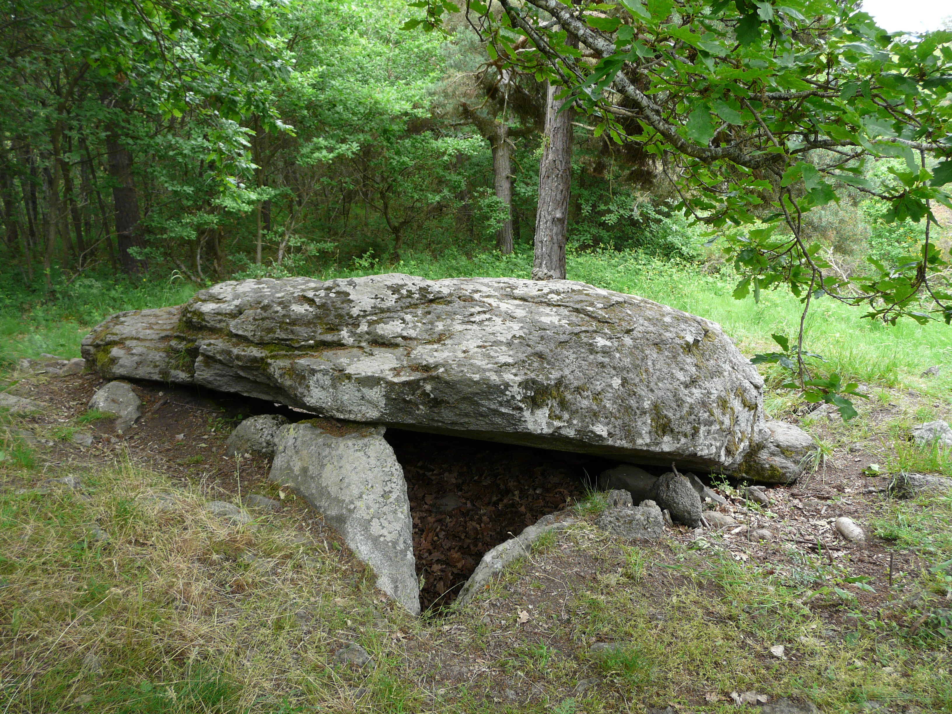 Le dolmen de la Pineyre au sommet du tumulus, Saint-Nectaire, Puy-de-Dôme, France.